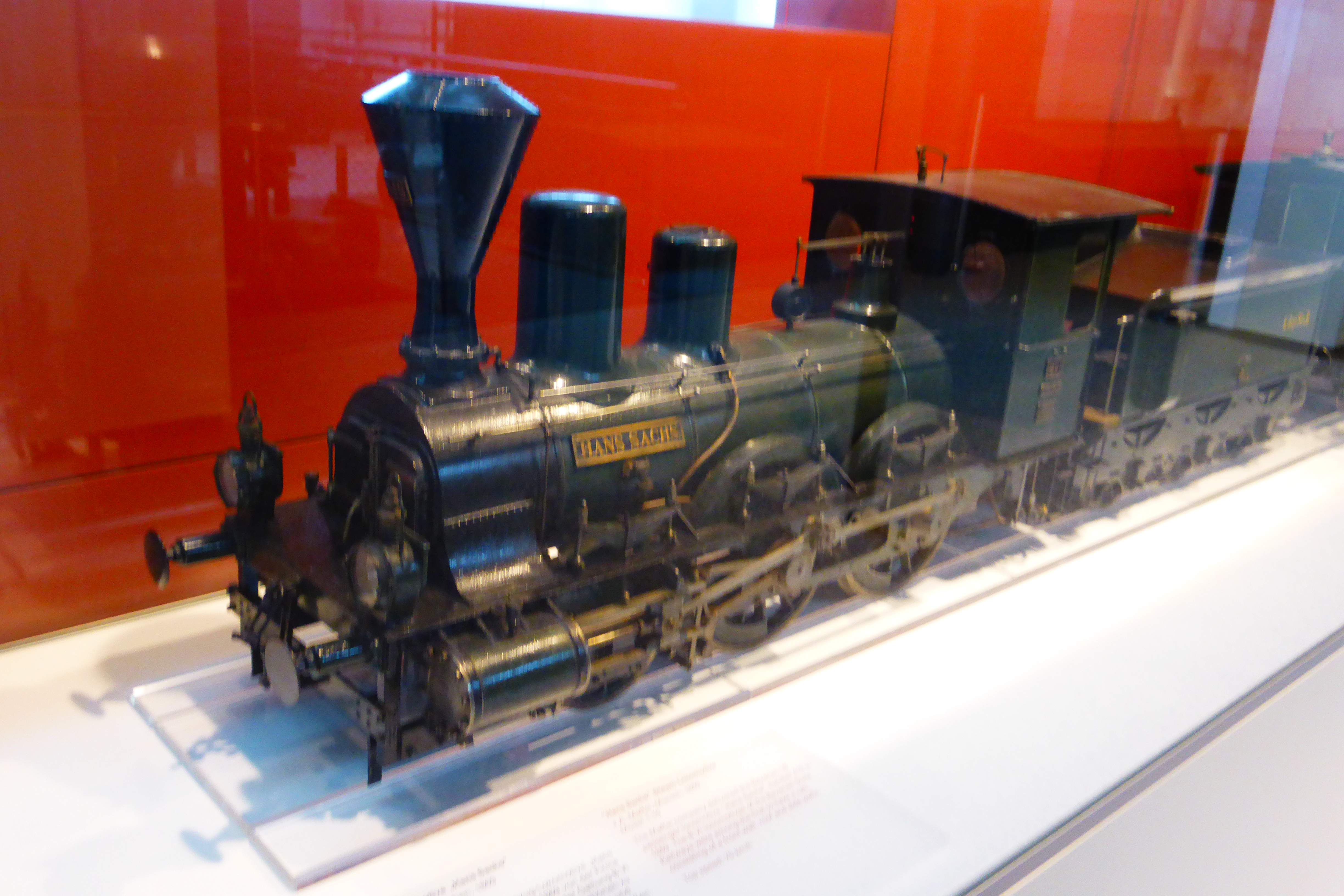 Modell der Bayerischen B VI 418 Hans Sachs im Verkehrszentrum München